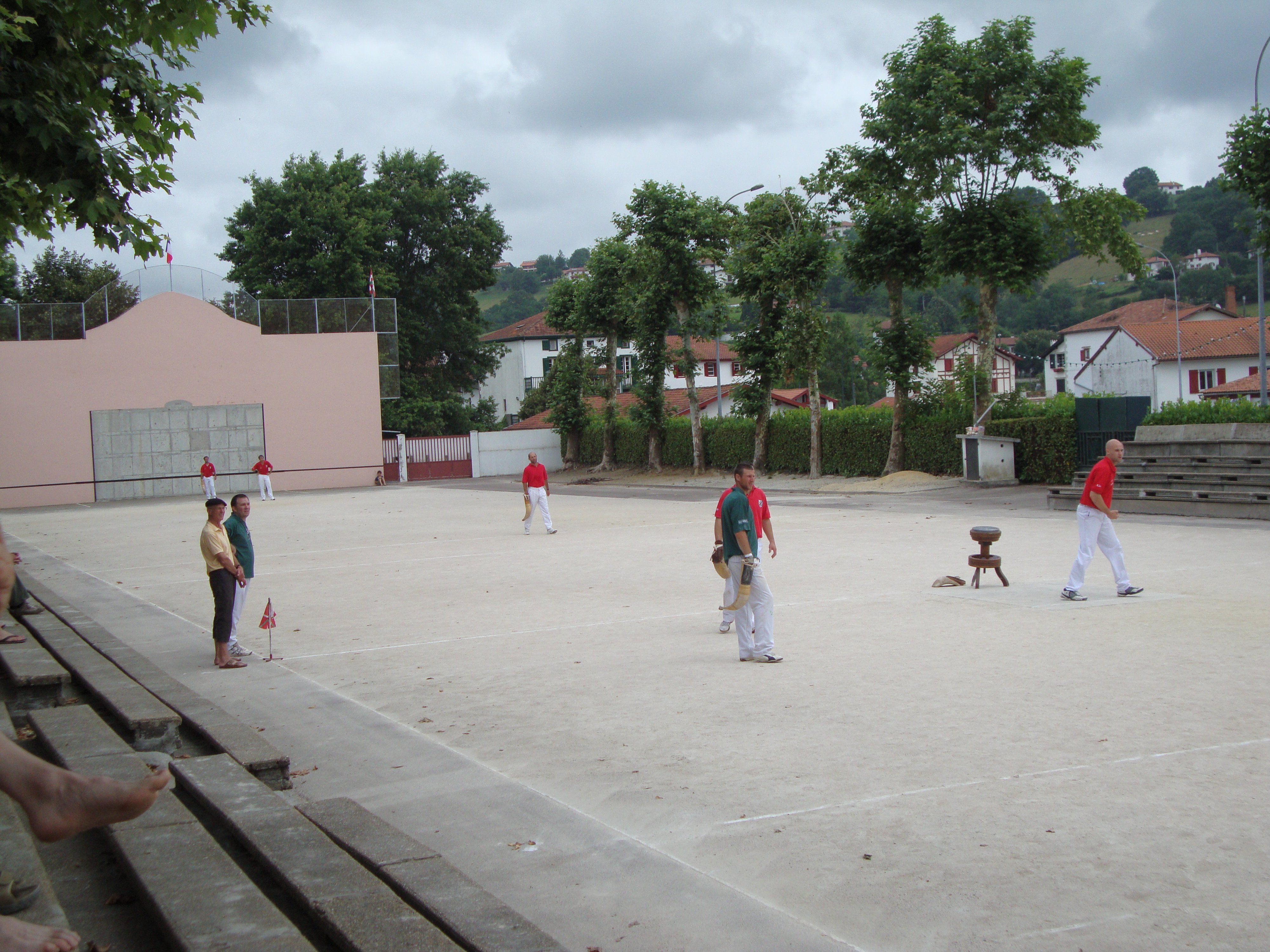 Hasparren (Pyr-Atl, Fr) Pelota, le mur de fond, Match de Rebot Hasparren (rouge) - Anglet (vert) pour le championnat de la ligue, le 4 juillet 2010